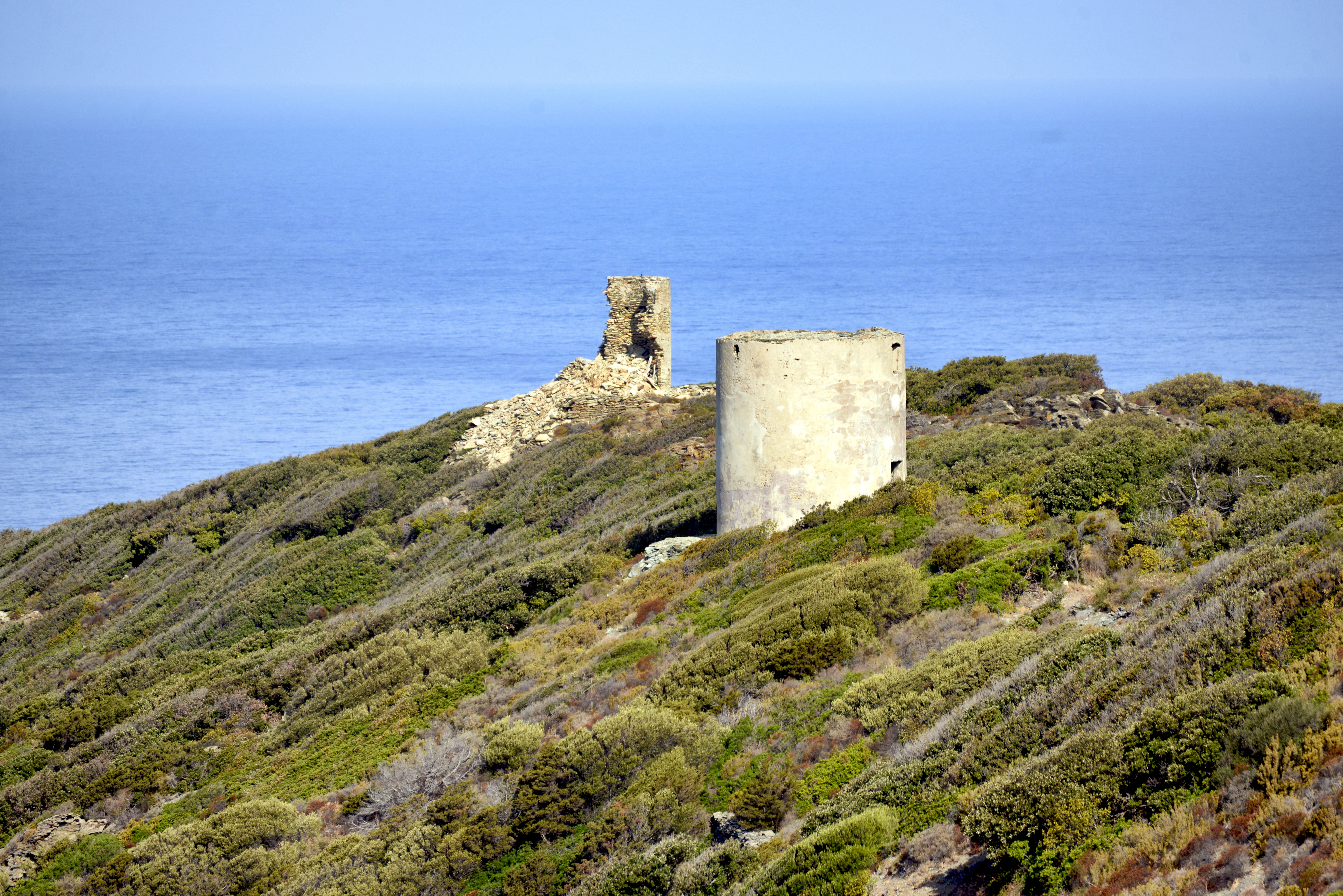 Morsiglia, Cap Corse - Moulins à vent en ruines au lieu-dit Monte Rossu.